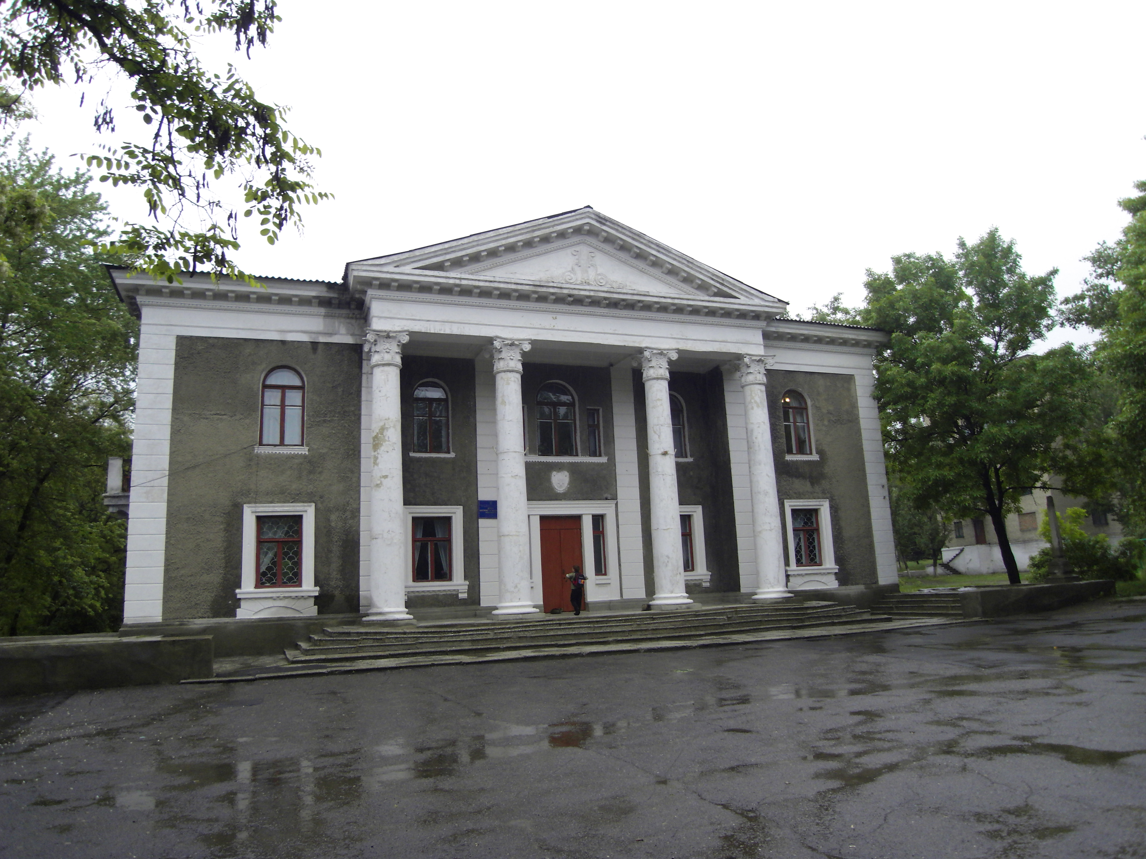 Будинок піонерів, Дзержинськ